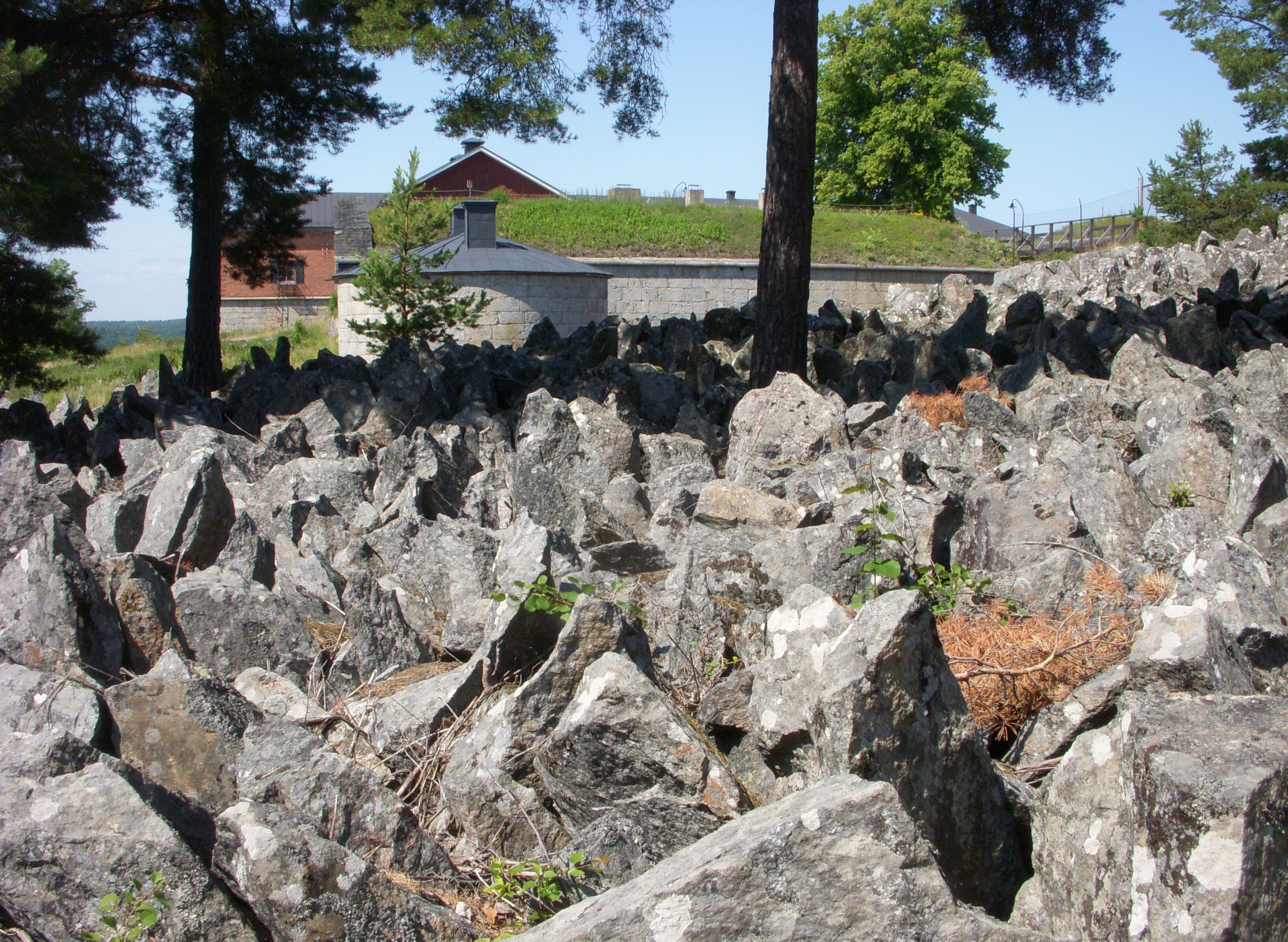 Stormhinder i form av spetsiga sprängsten utanför Rindö redutt